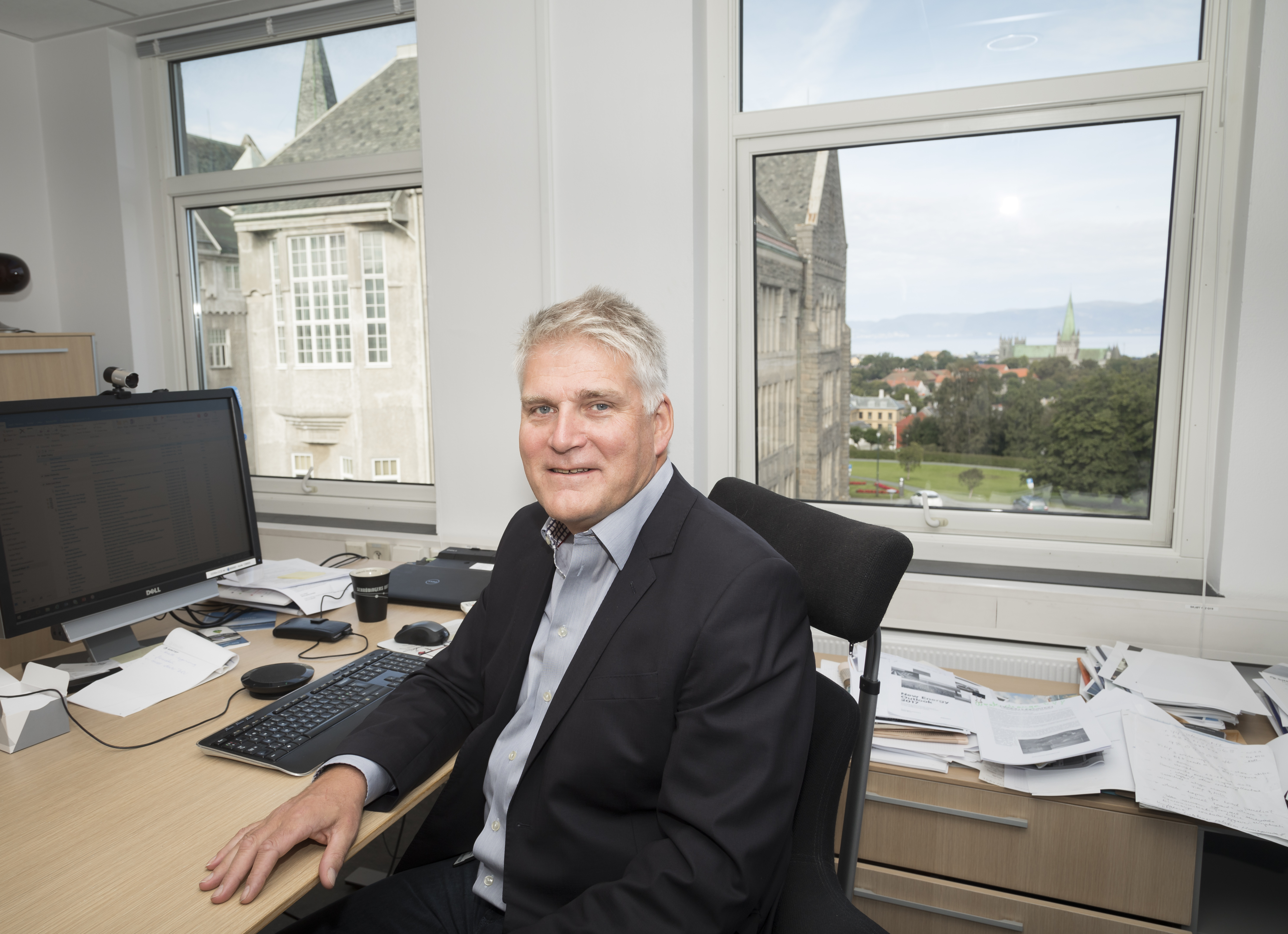 Nils Røkke, Direktør for bærekraft i SINTEF. (Foto: Thor Nielsen/SINTEF)